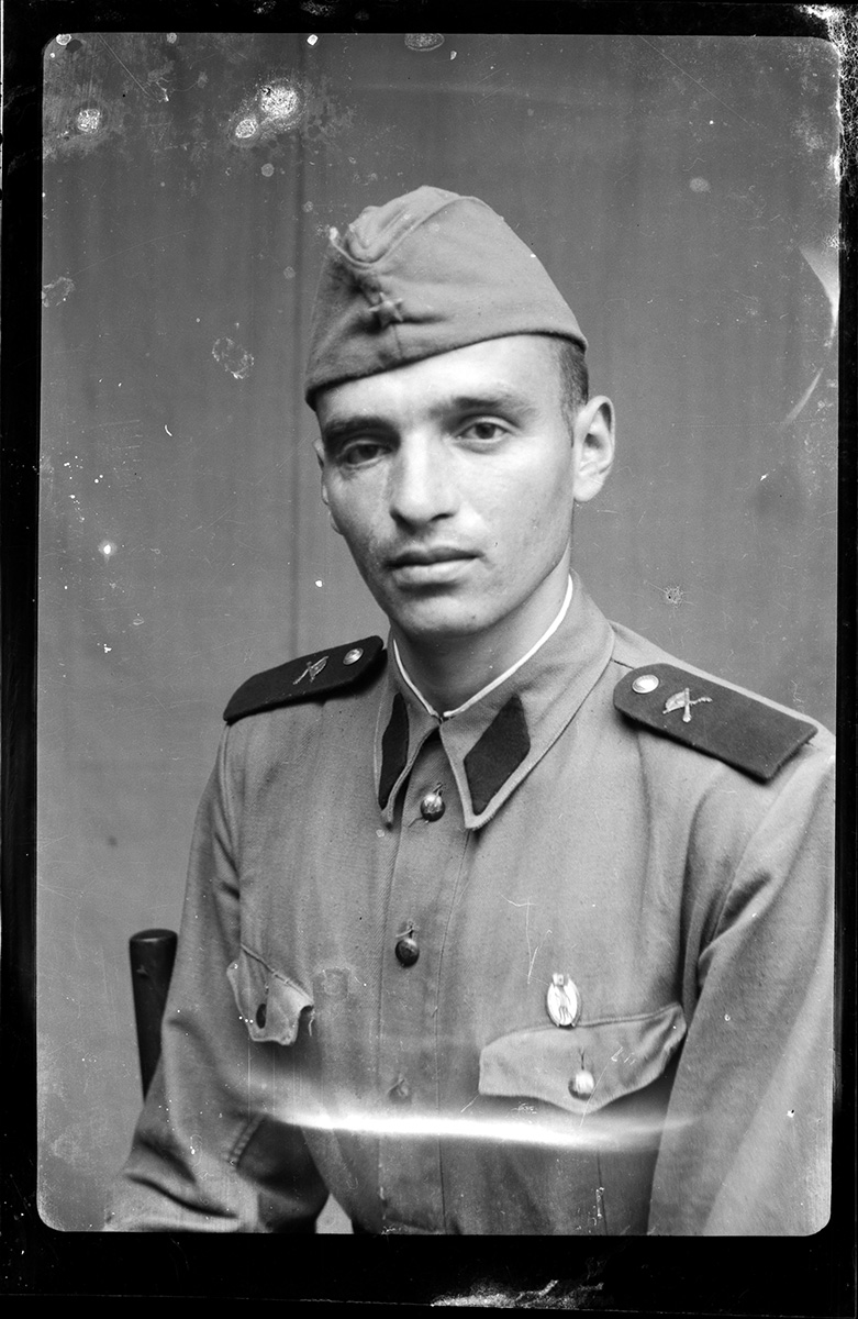 Soldat de artilerie, cu bluza și boneta model 1952, dar epoleți și semn de armă model 1948. Celuloid — Emil Boboescu